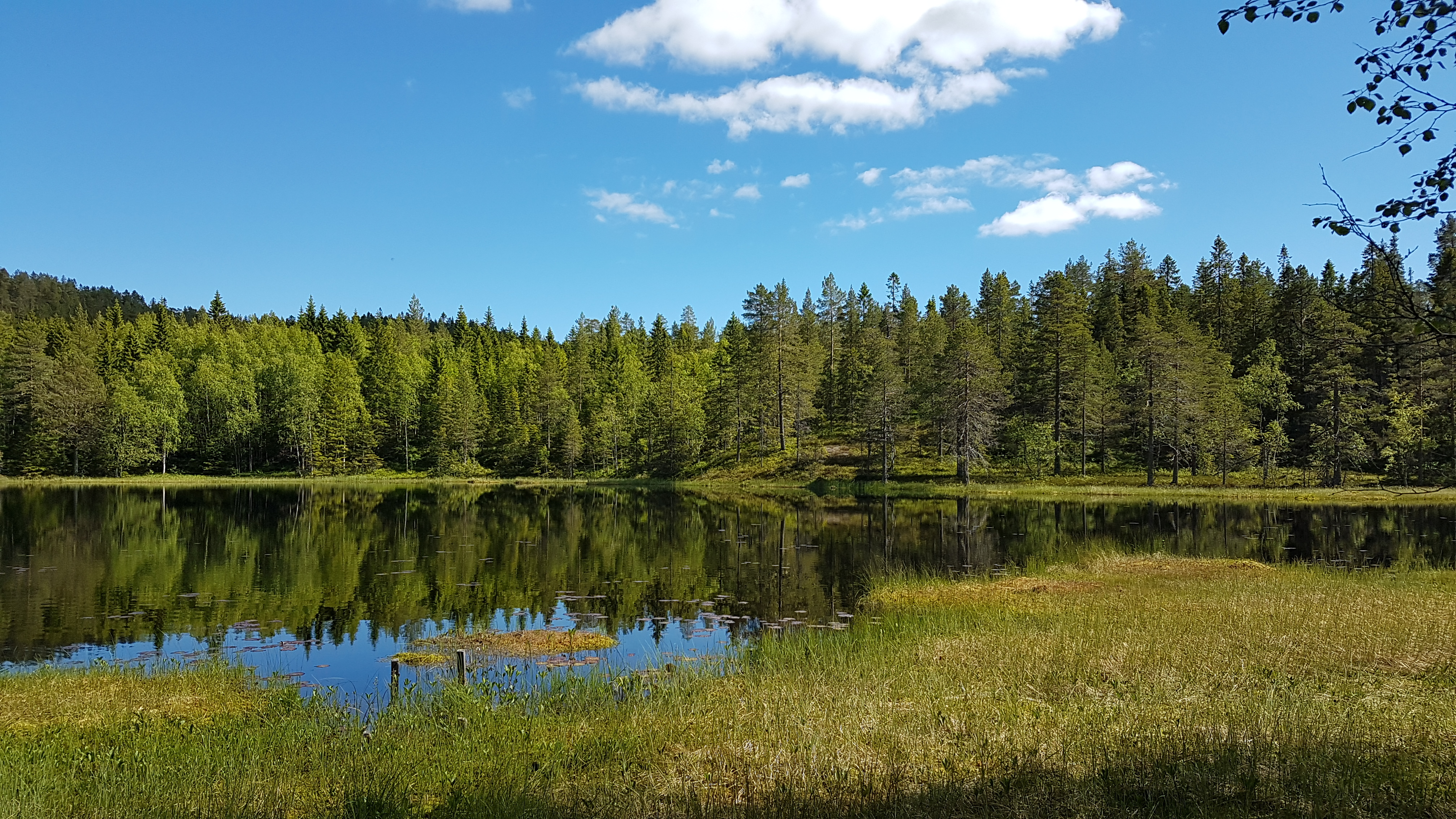 Skrattaborrtjärnen i Skuleskogens nationalpark 2017.